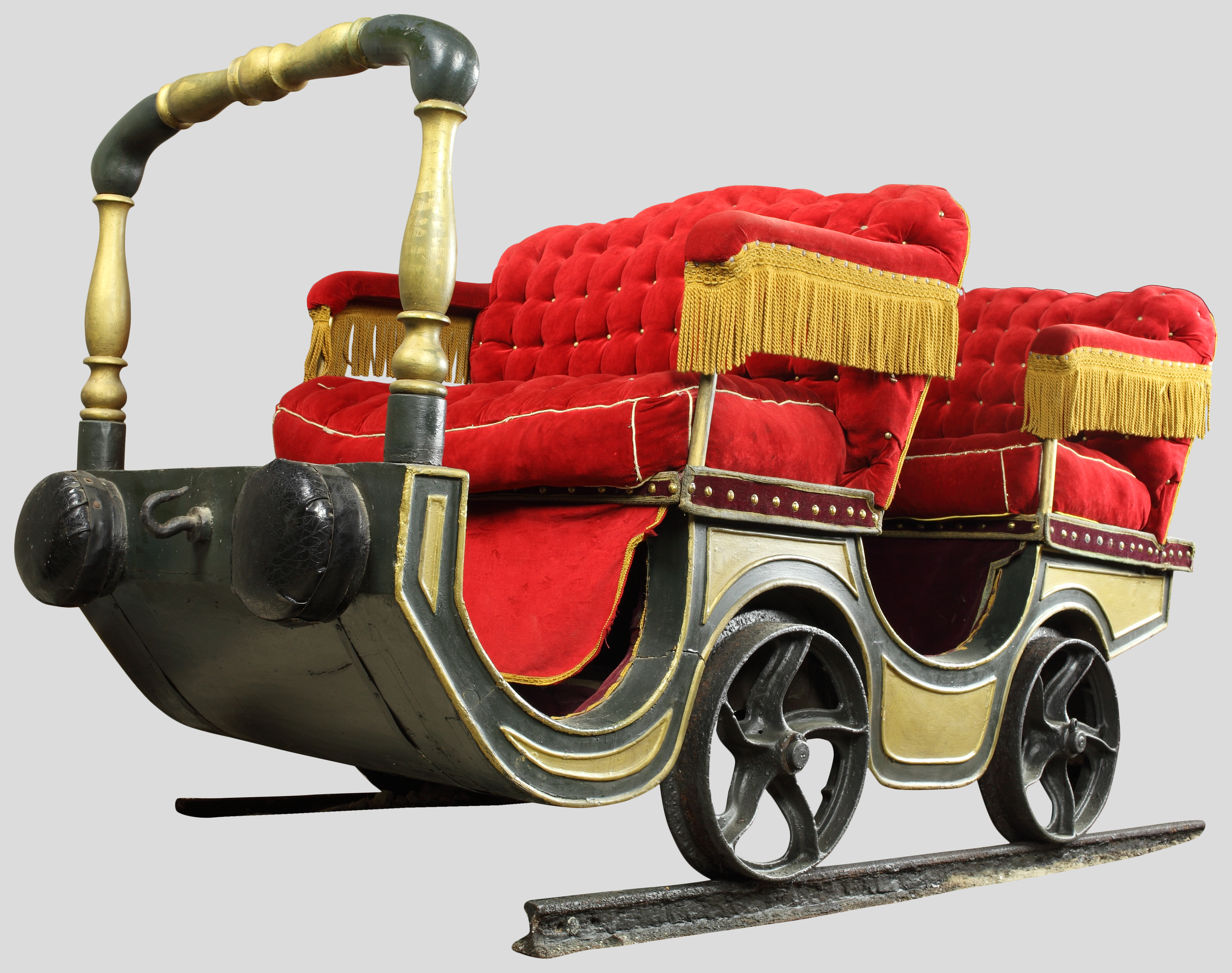 Horse-drawn train, Wieliczka salt mine